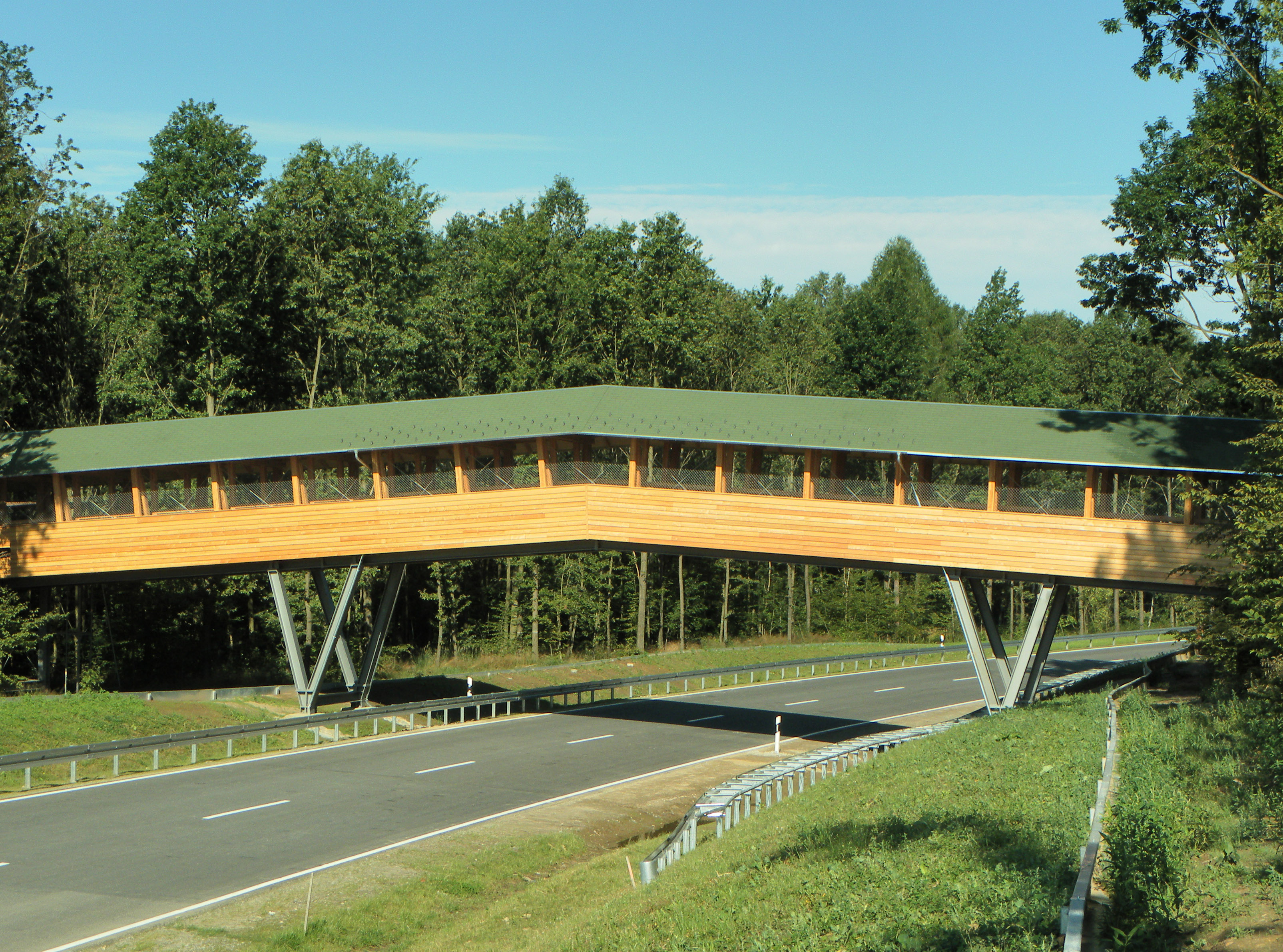 Brücke an der südwestlichen Stadtumfahrung von Bischofswerda, errichtet für Fußgänger und zum Schutz der Haselmaus